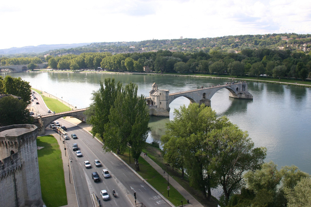 Avignon famous bridge - le pont d'Avignon